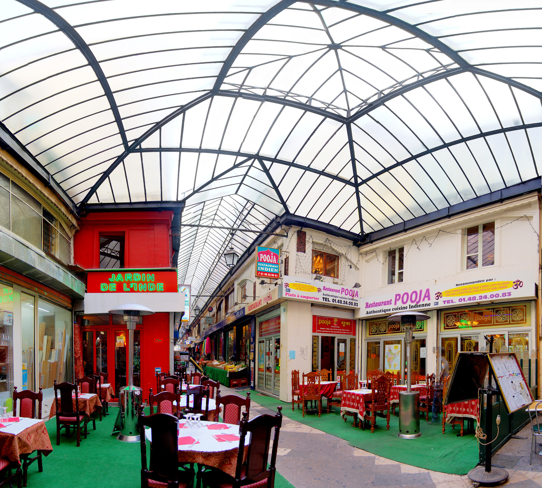 Passage Brady, interieur vue de l'est .